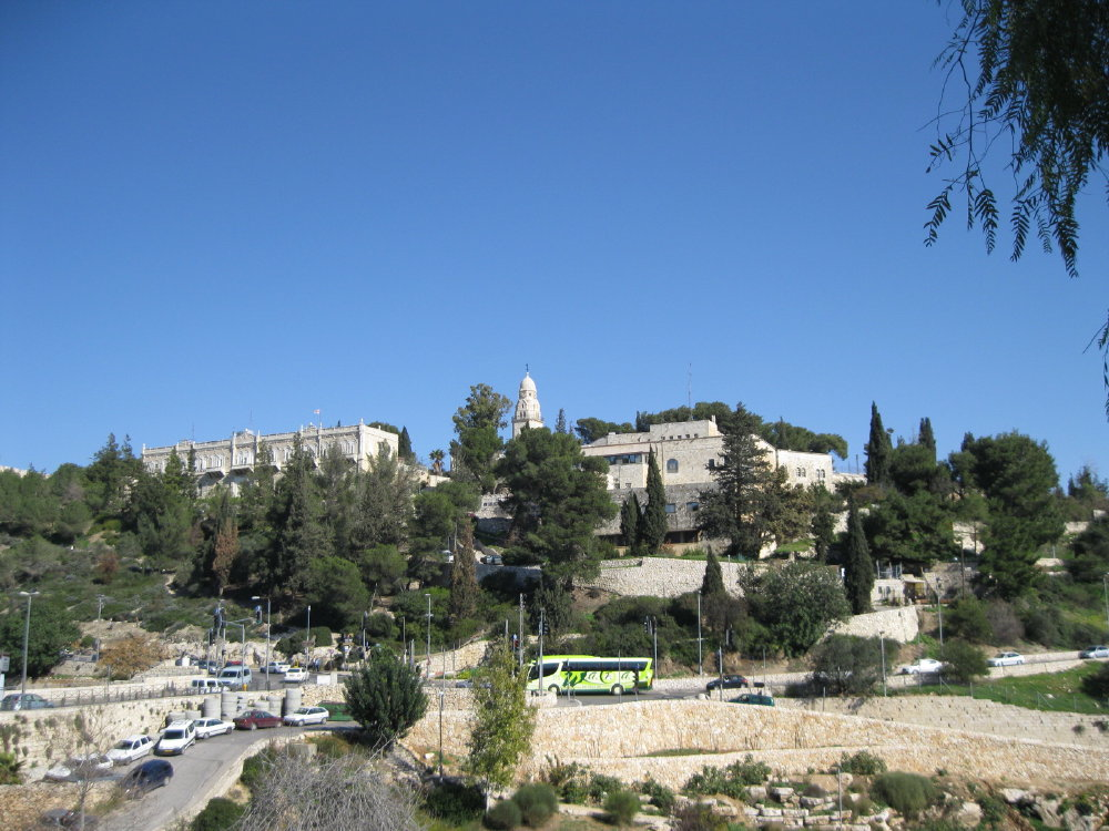 בית הספר גובאט הוא בית ספר פרוטסטנטי ששימש תחילה כבית ספר מקצועי לנערים ערבים. נקרא על שם סמואל גובאט, הבישוף הפרוטסטנטי של ירושלים שהקים אותו. מ-1967 שוכן בו מכון אמריקאי לחקר ארץ הצבי, מכללה אוניברסיטאית אמריקאית. בחצר המכון שוכן בית הקברות הפרוטסטנטי. This is a photo of a heritage building in Israel. Its ID is 1-3000-807